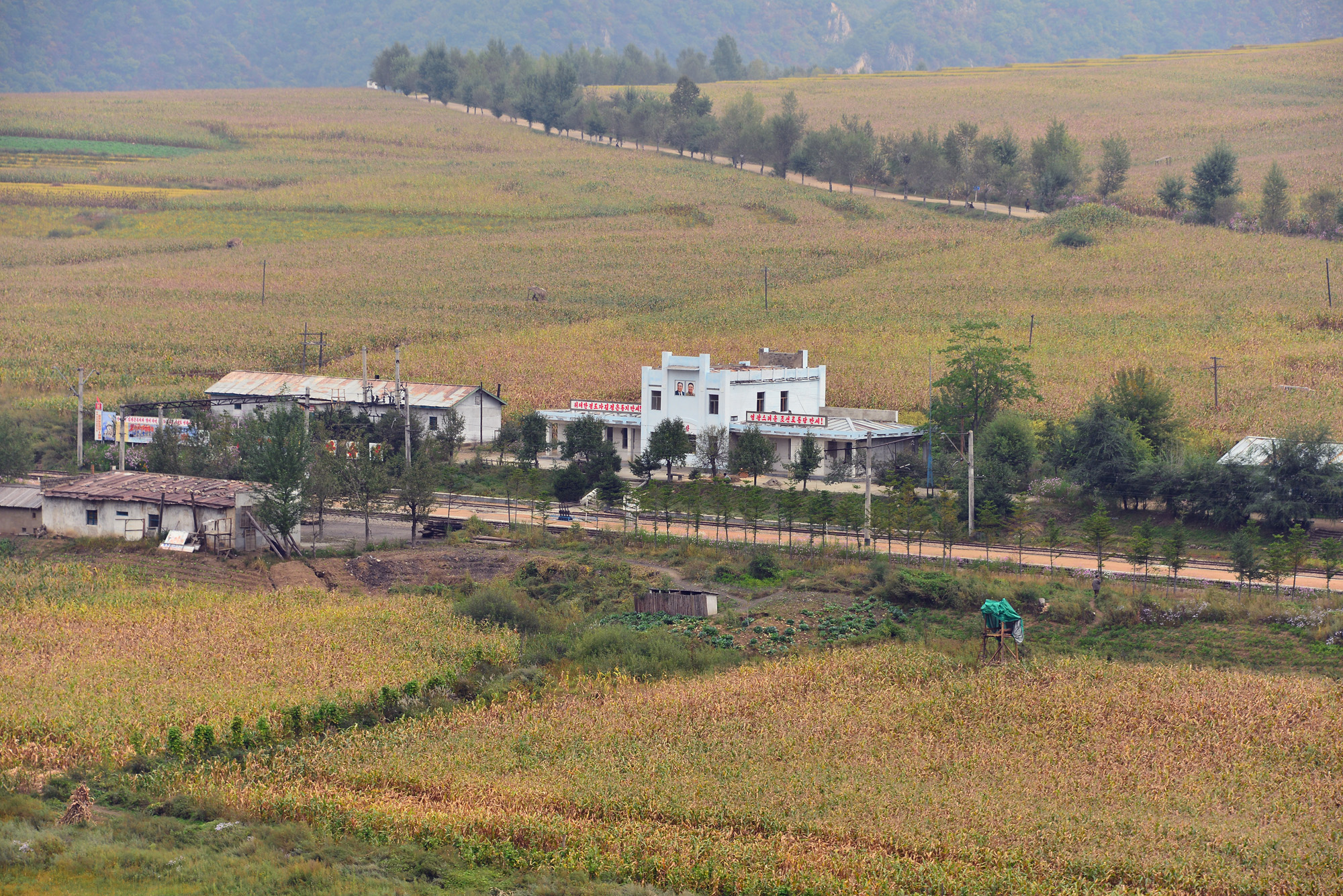 巡道工出品 Photo by Xundaogong 珉湯駅 민탕역 Min tan